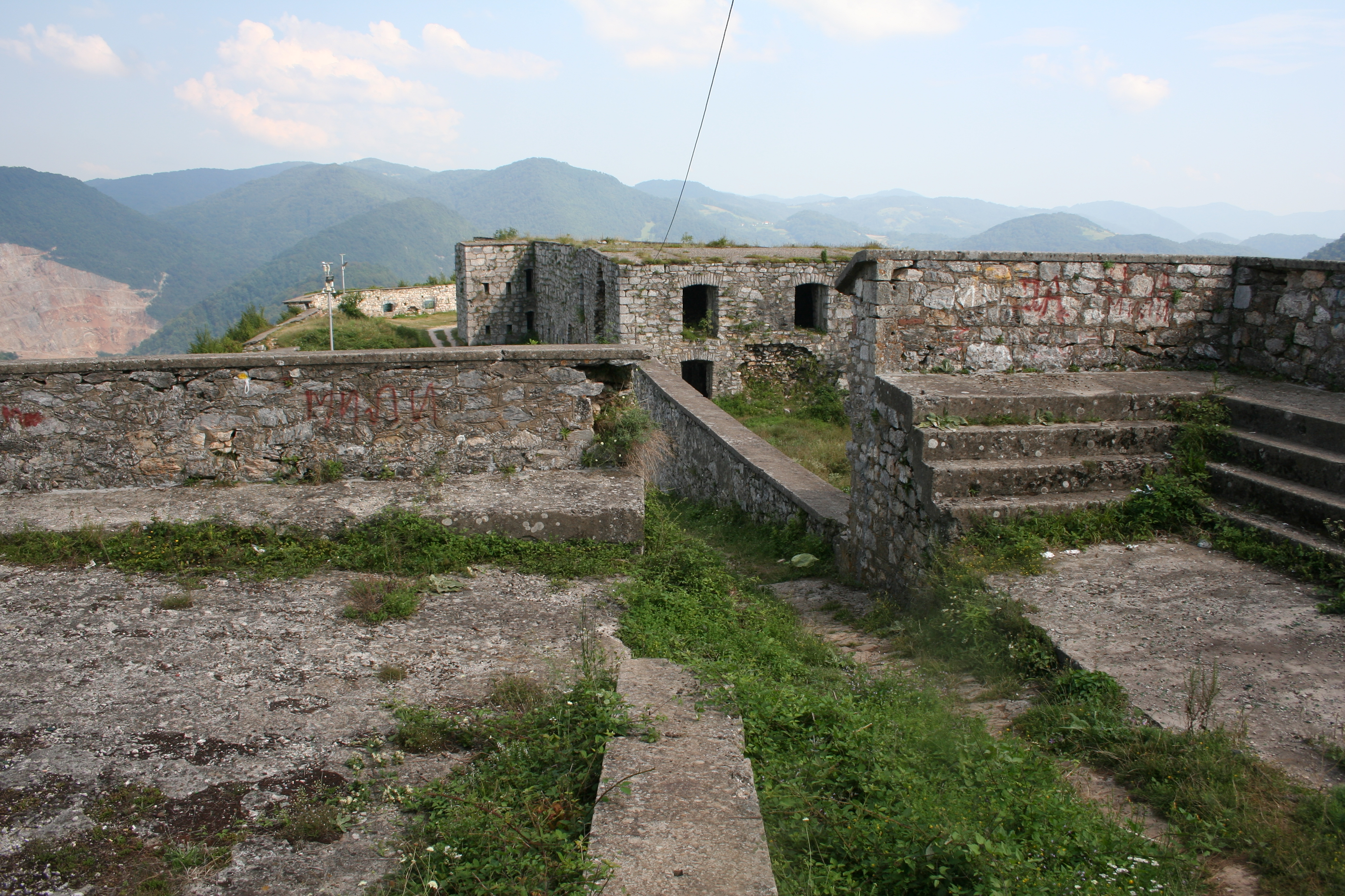 Stari grad Zvornik NKD390